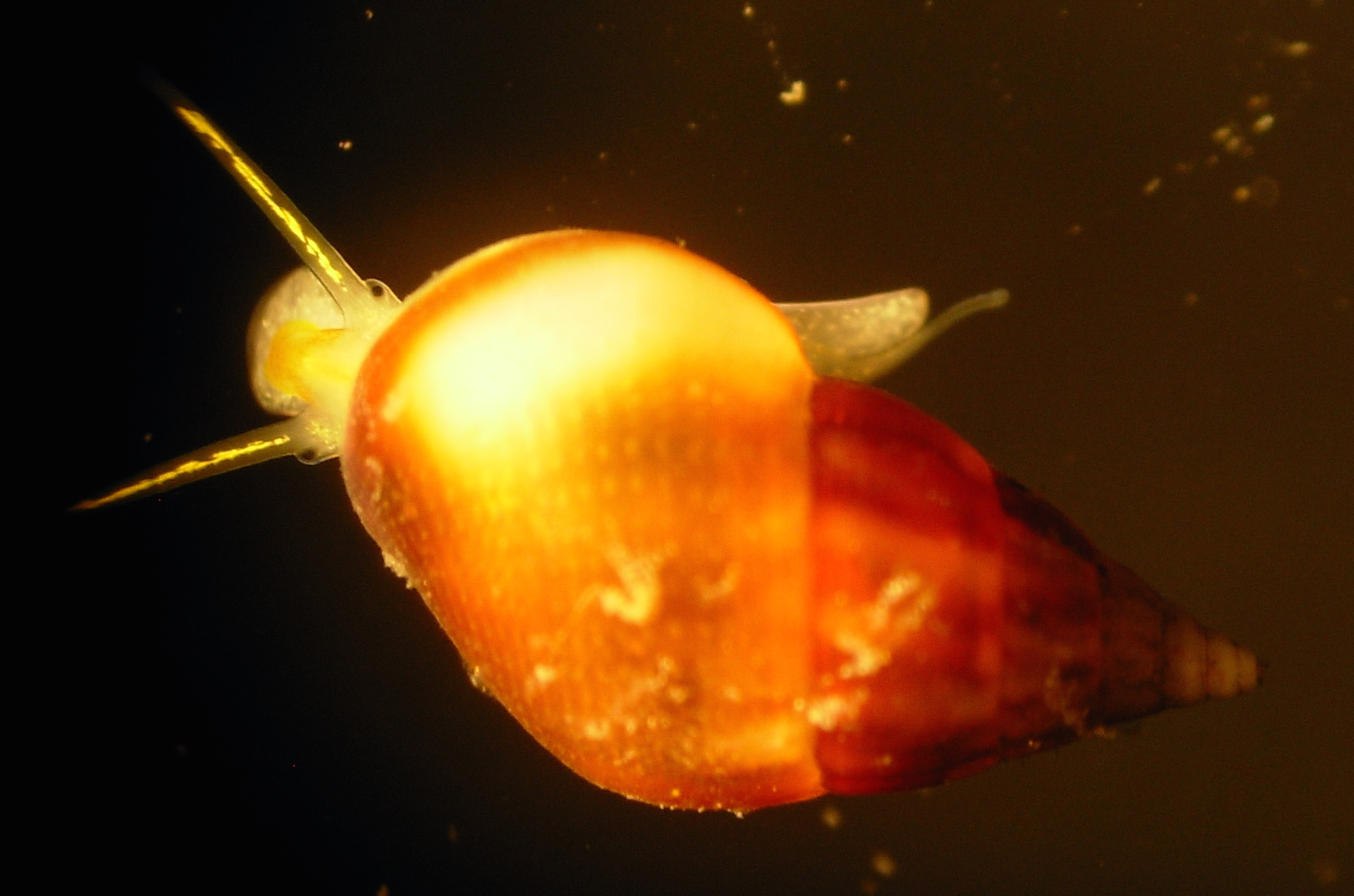 Rissoa lilacina. Vue dorsale du dernier tour de la coquille et de la tête de l'animal.